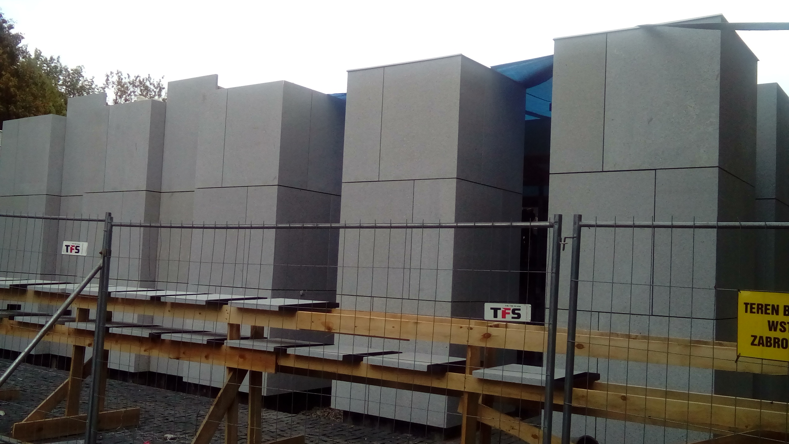 Kwatera na Łączce